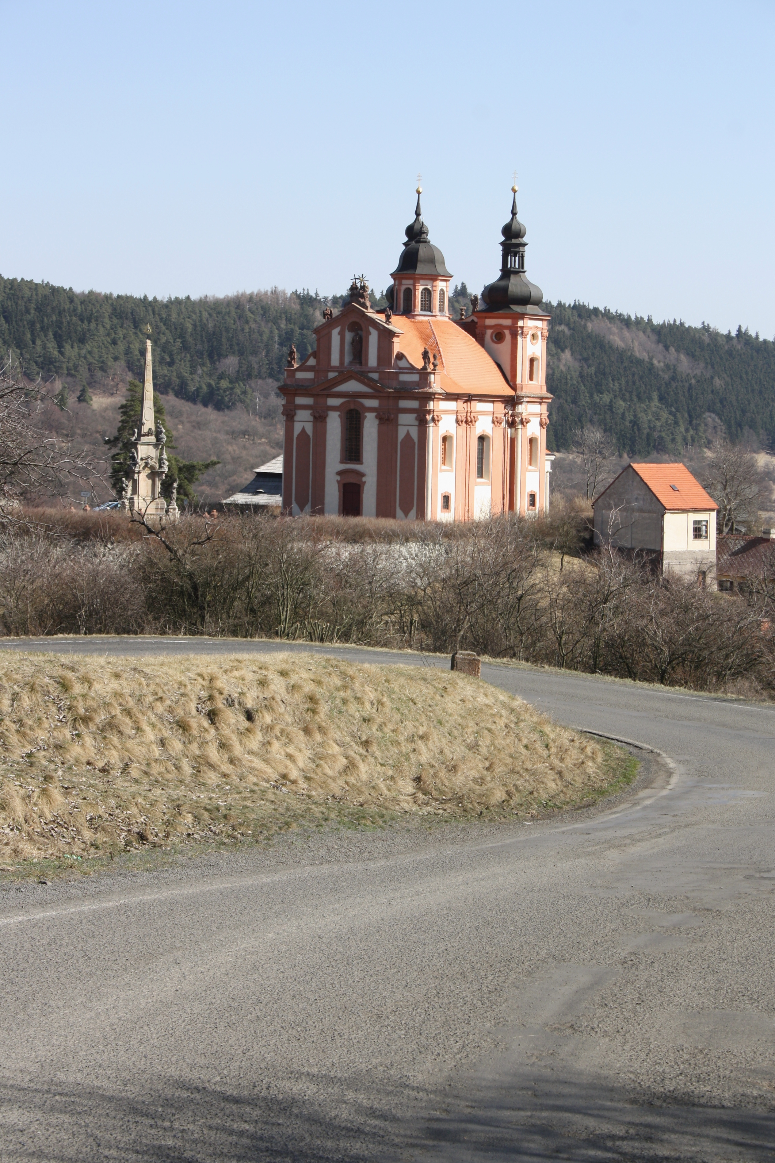 Valeč